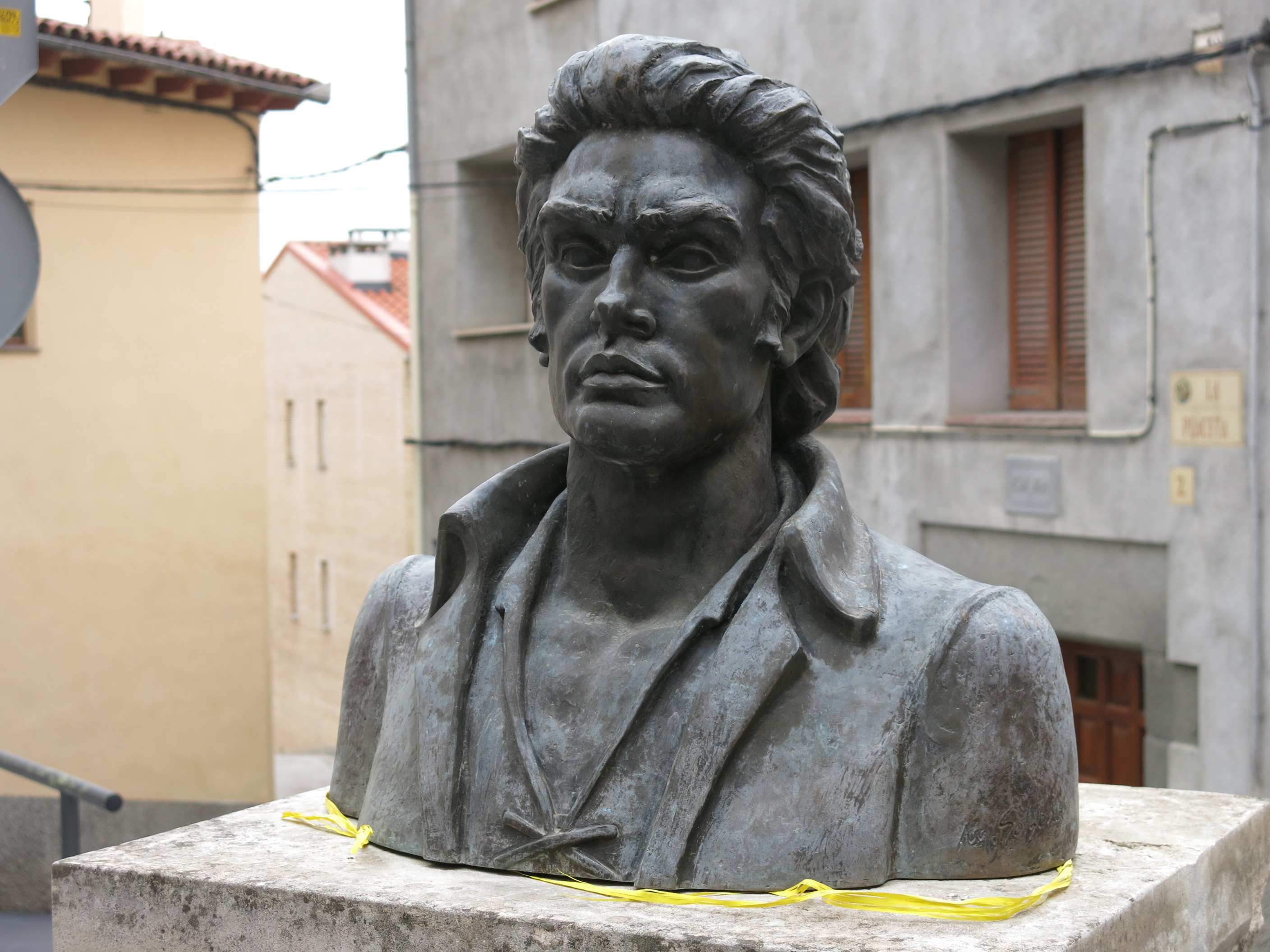 Monument a Francesc Macià Ambert, Bac de Roda, a la Placeta de Roda de Ter